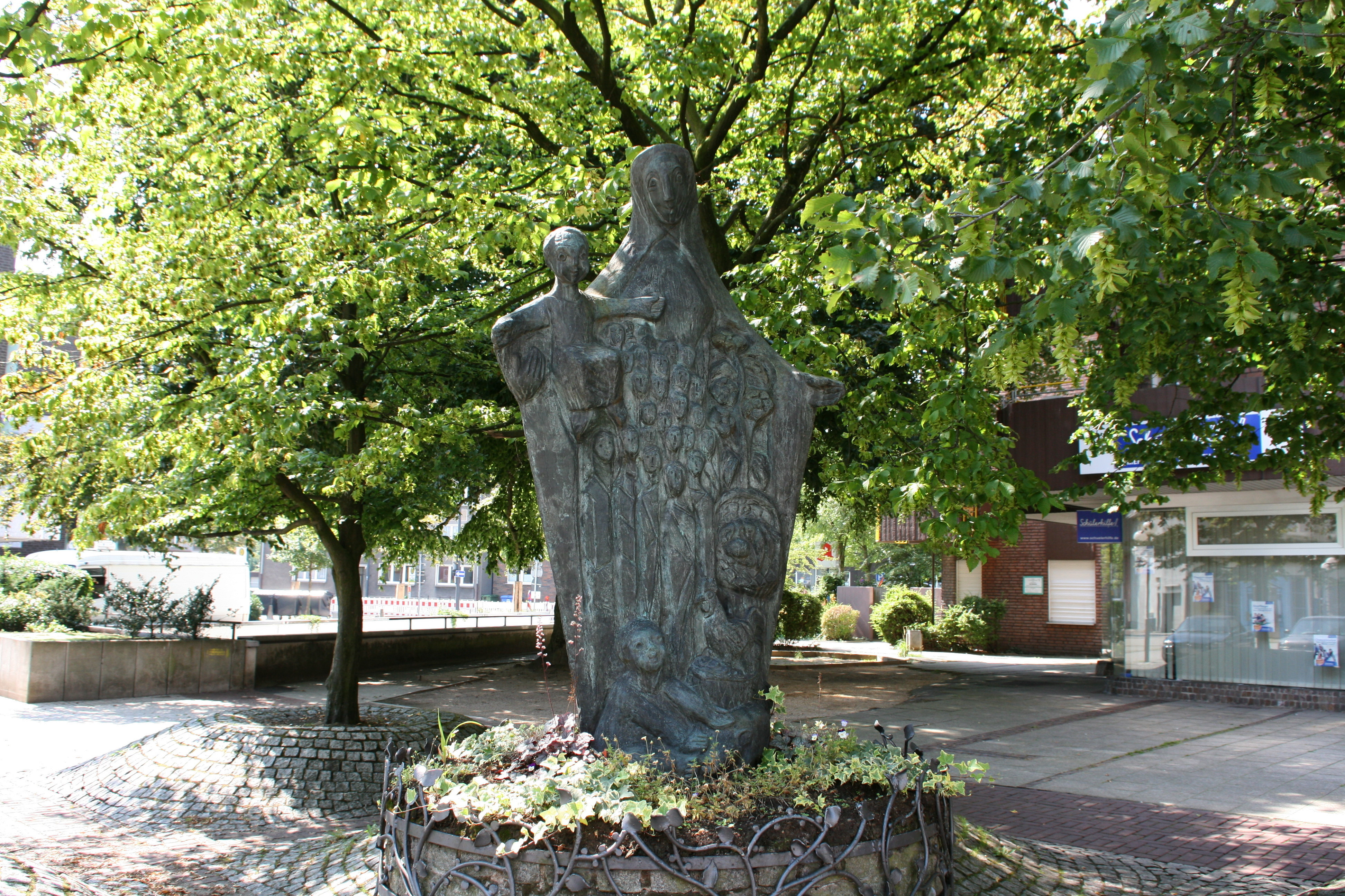 „Schutzmantelmadonna“ von Hilde Schürk-Frisch, Marktplatz in Herten